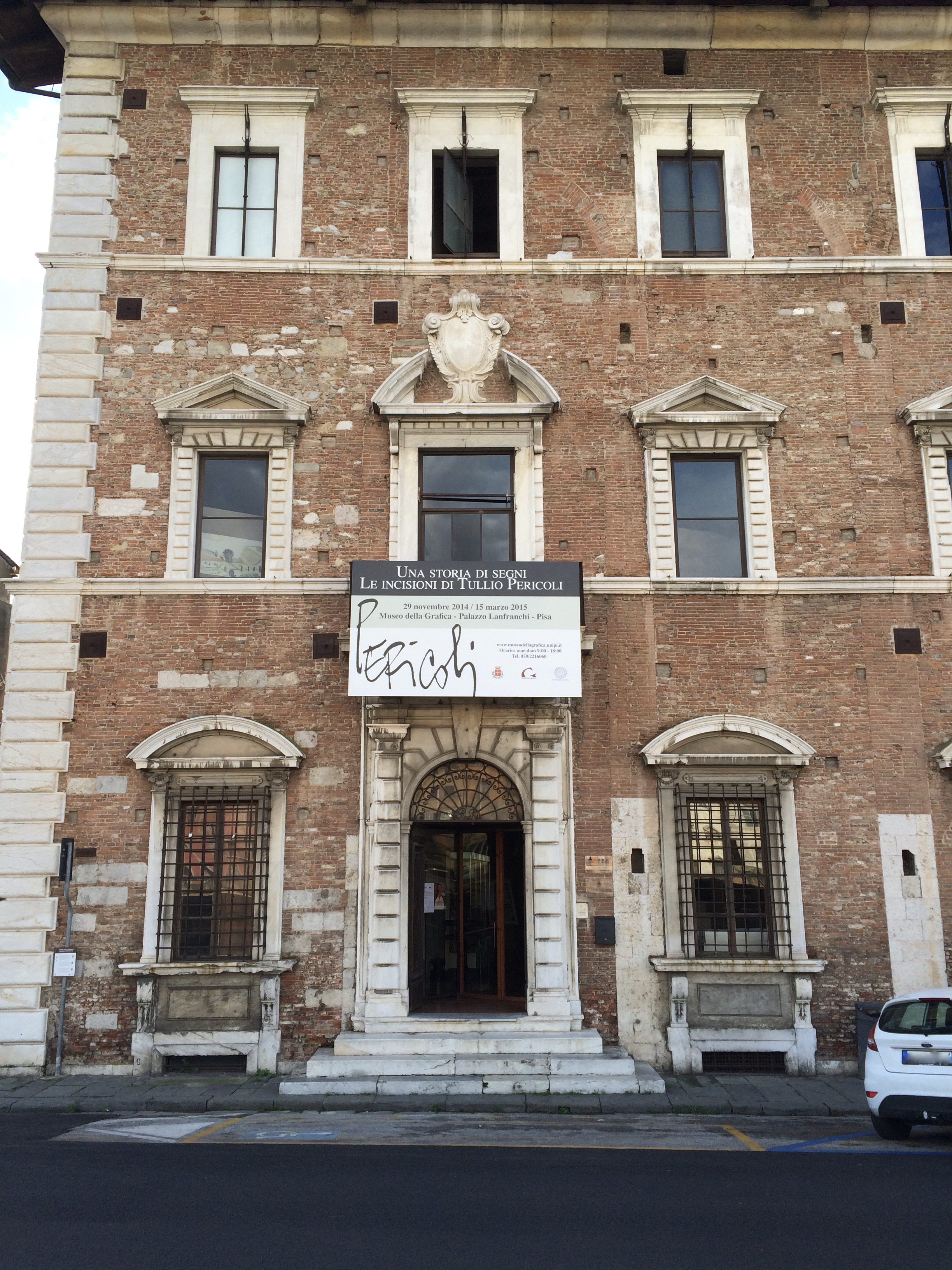 Palazzo Lanfranchi